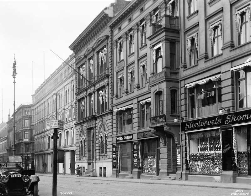 Stortorvet i Oslo, forretningsgårder, skotøyforretning, Kaffistova, bank, Kreditkassen, bil. Stortorvet 7, Stortorvet 8 med Kaffistova og Karl Johans gate 15